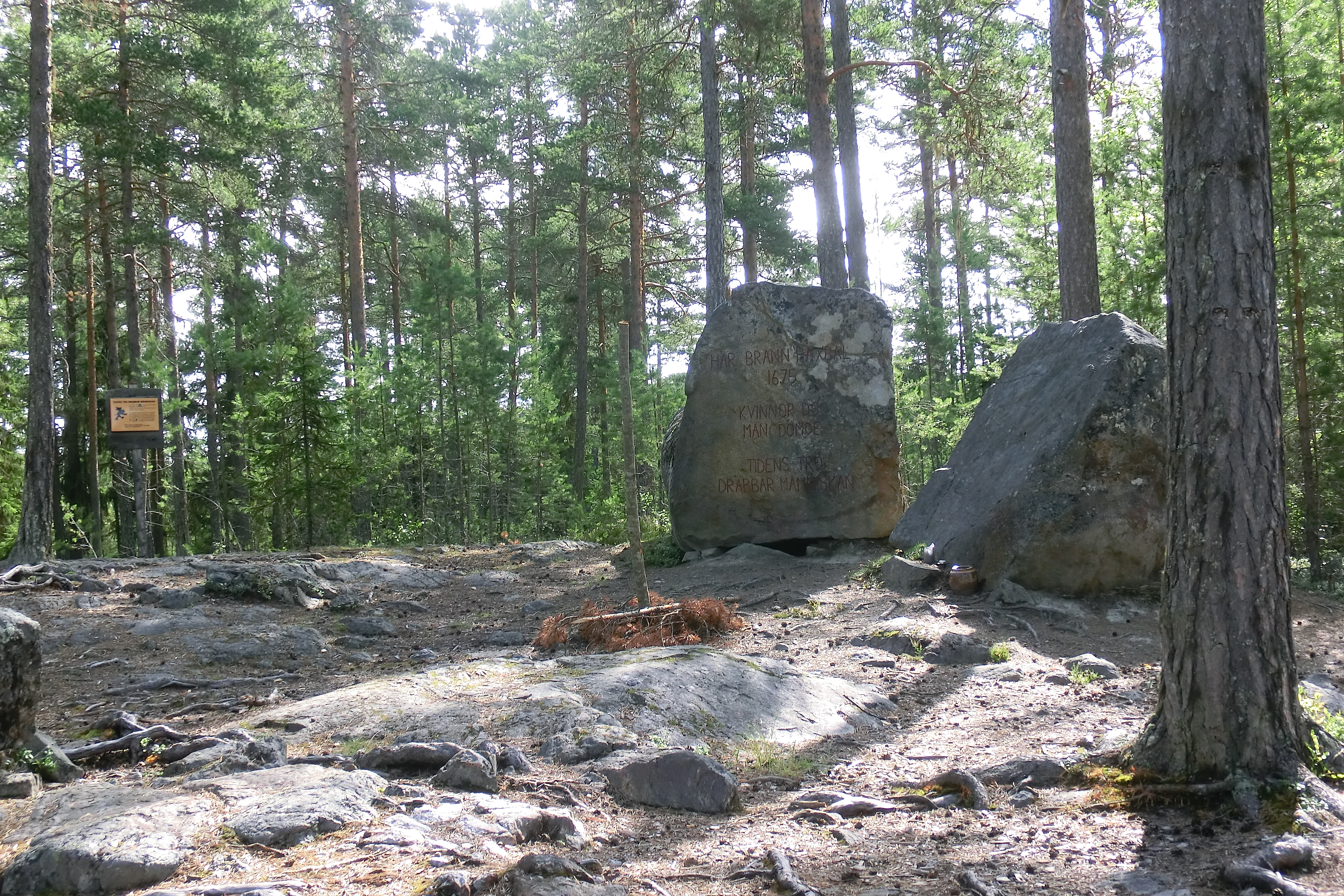 Häxberget, minnesmärke rest över en avrättningsplats från 1675